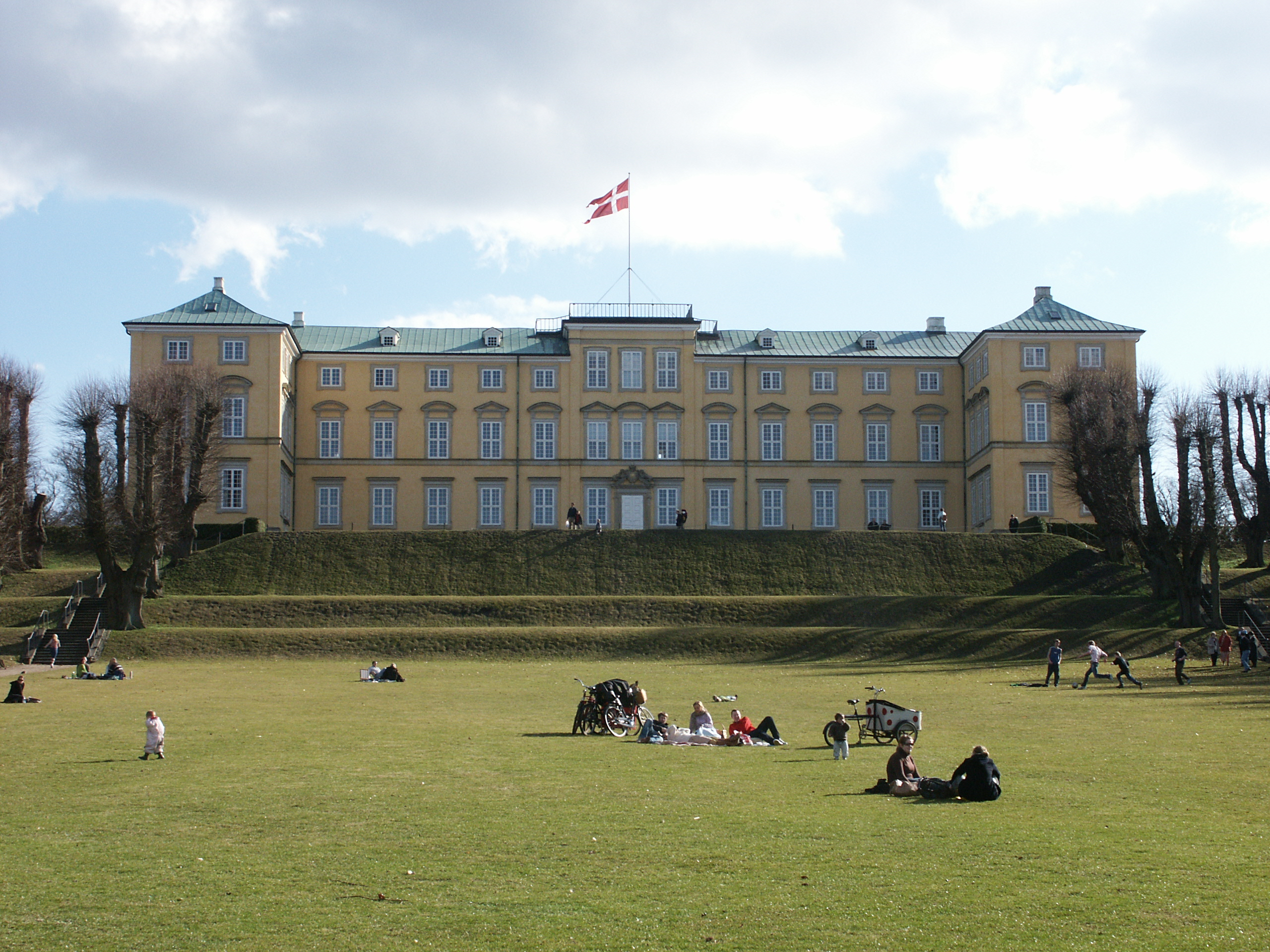 Frederiksberg Palace (Frederiksberg Denmark)